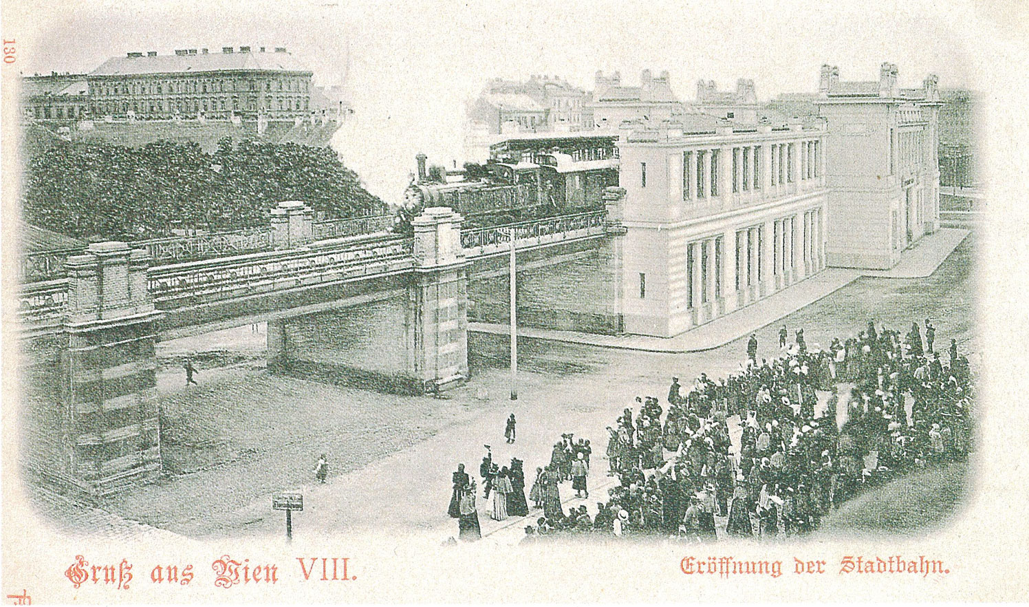 Eröffnung der Stadtbahn in Wien, Ansichtskarte 1898